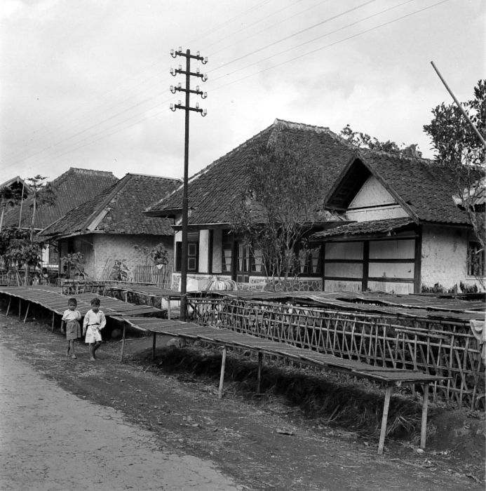 Negatief. Het drogen van bevolkingstabak, Cisurupan aan de weg Garut-Cikajang